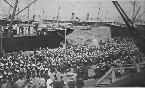 Toupes anglaises avec le casque spécifique débarquant à Salonique.